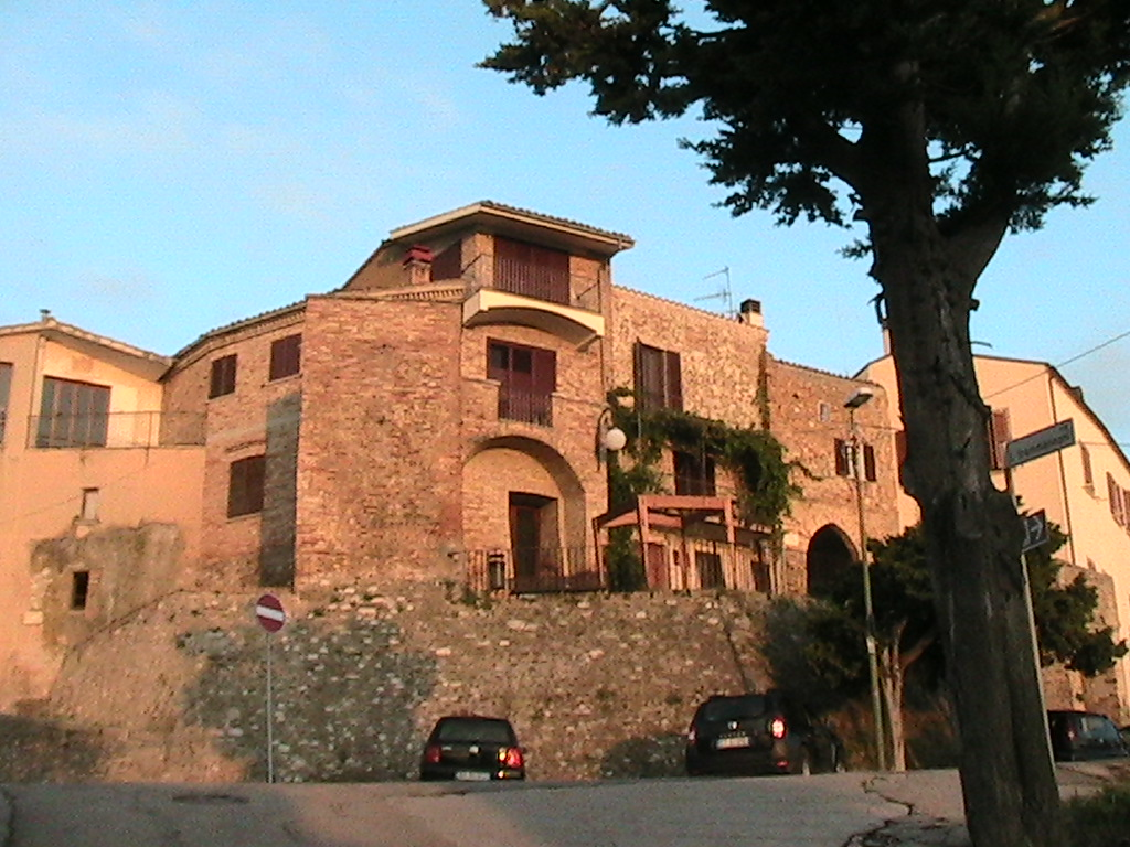 Scorcio